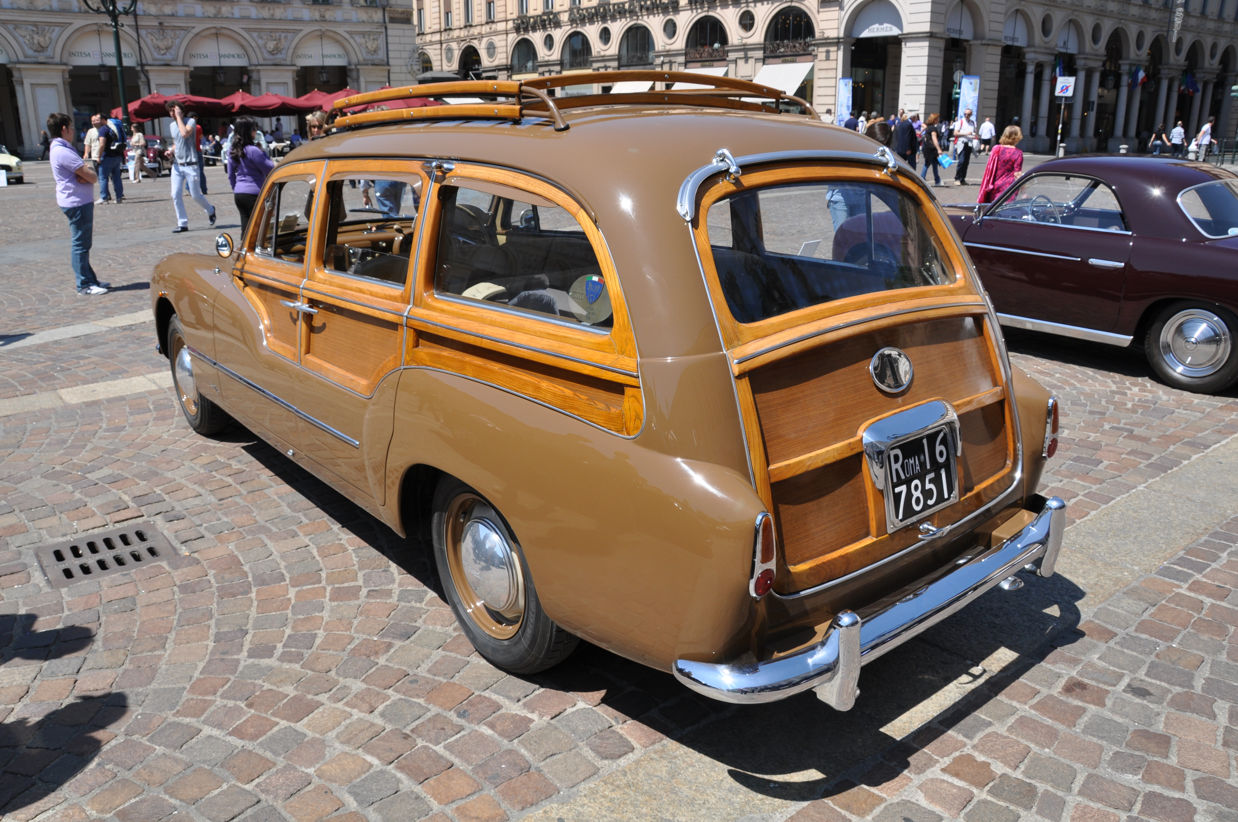 Lancia Aurelia Viotti Giardinetta del 1952 su autotelaio tipo "B53".